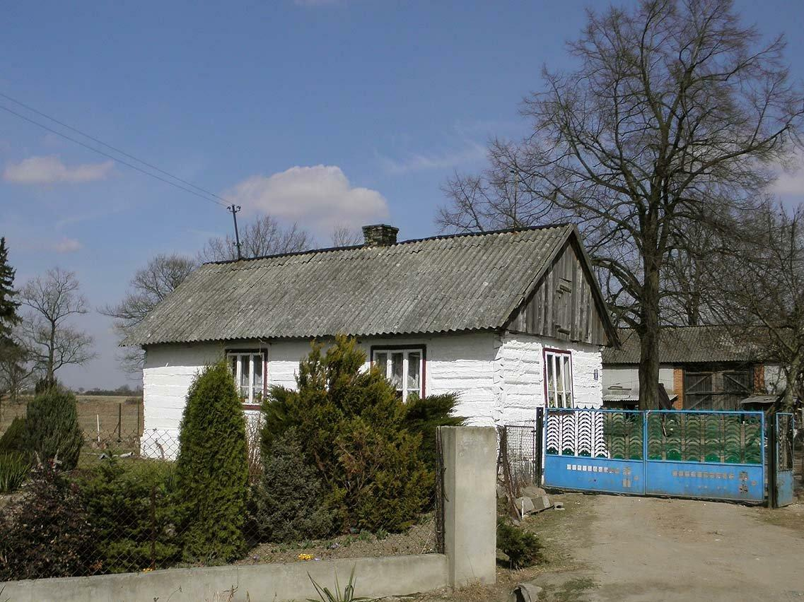 Wola Lipieniecka Mała 81.